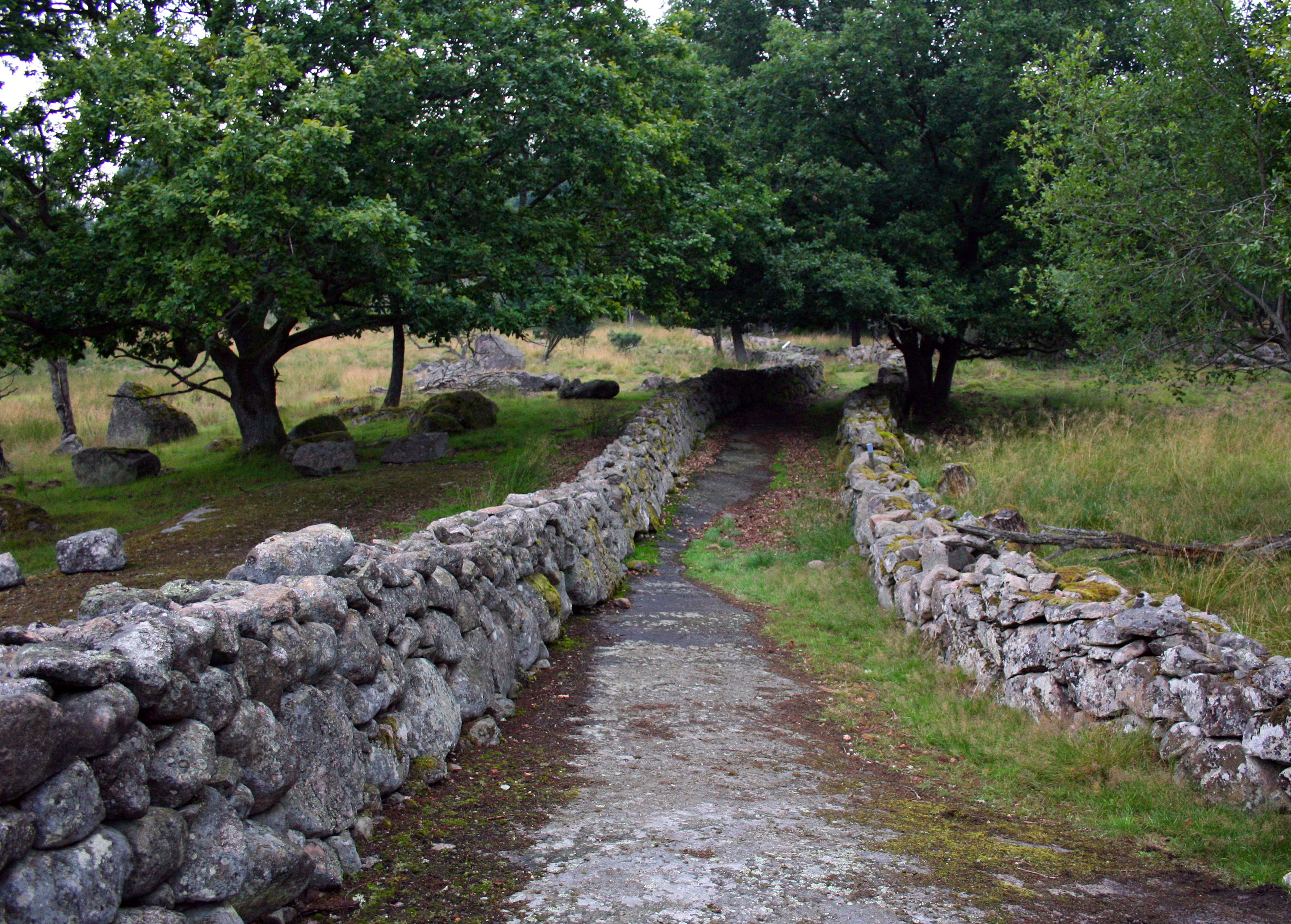 Fägata vid det gamla torpet Kyrkesta, Eriksberg, Blekinge